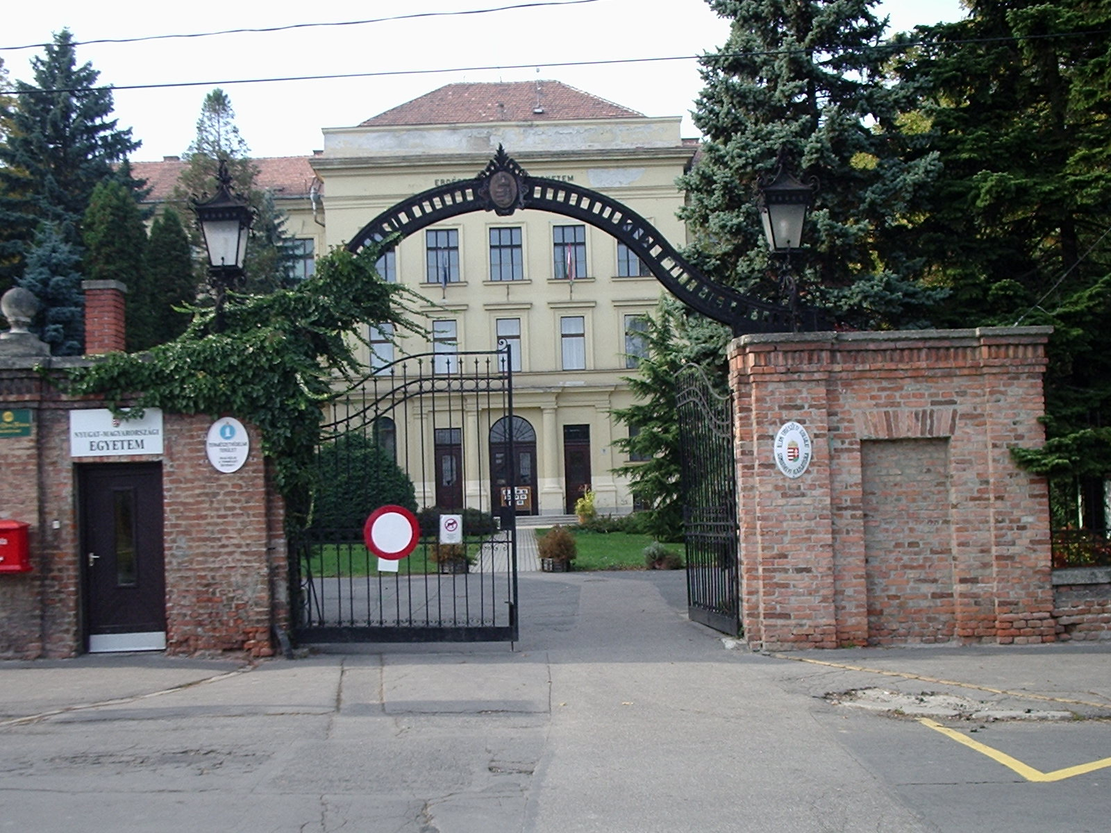 Saját készítésű kép HV 2005. október 23., 19:04 (CEST)